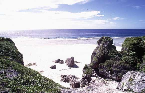 Atiu coast. Берег острова Атиу.